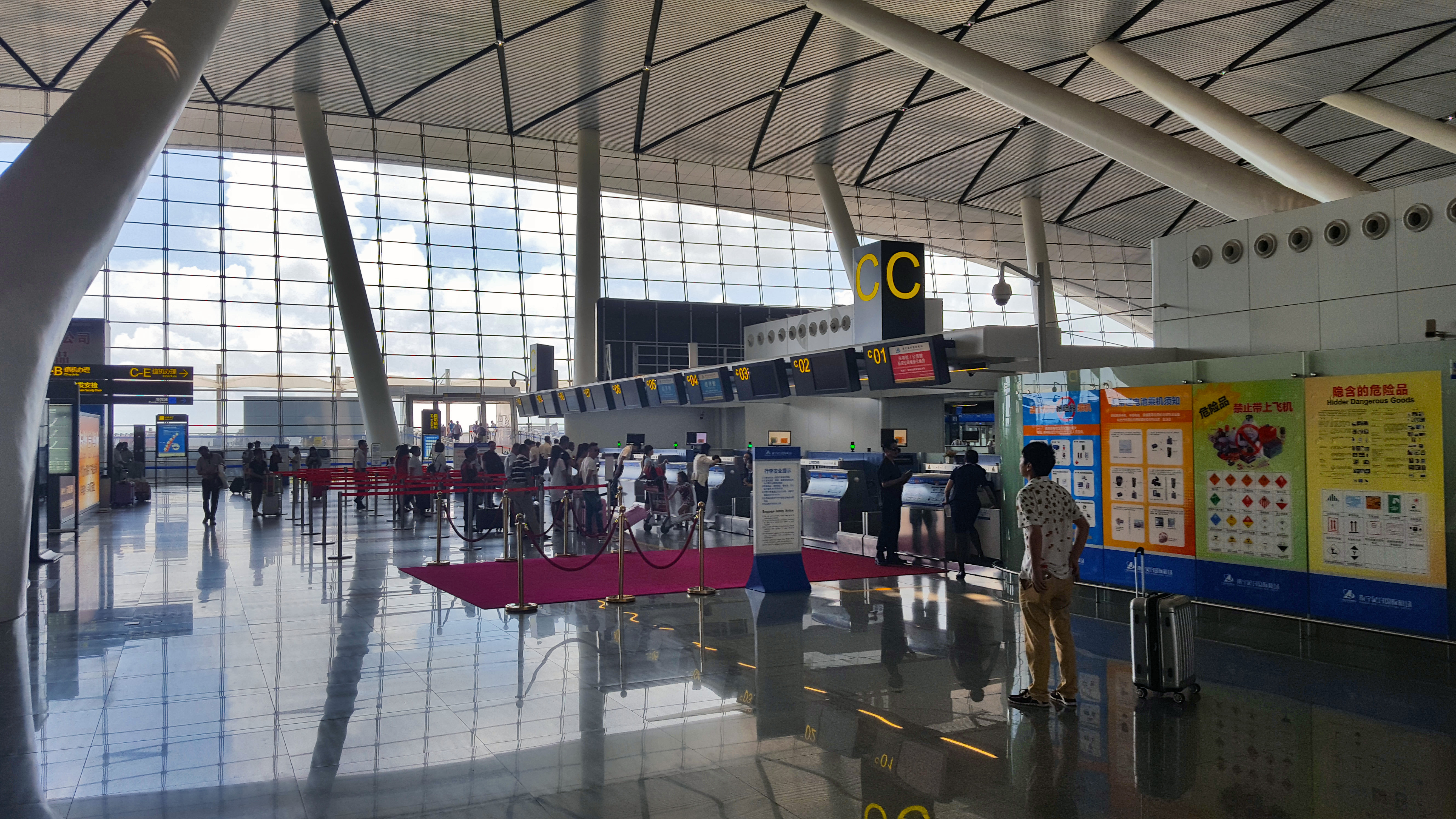 зона посадки - стойки регистрации